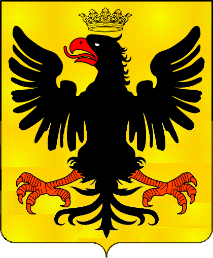 Stemma degli Odone (Genova e Rossiglione).